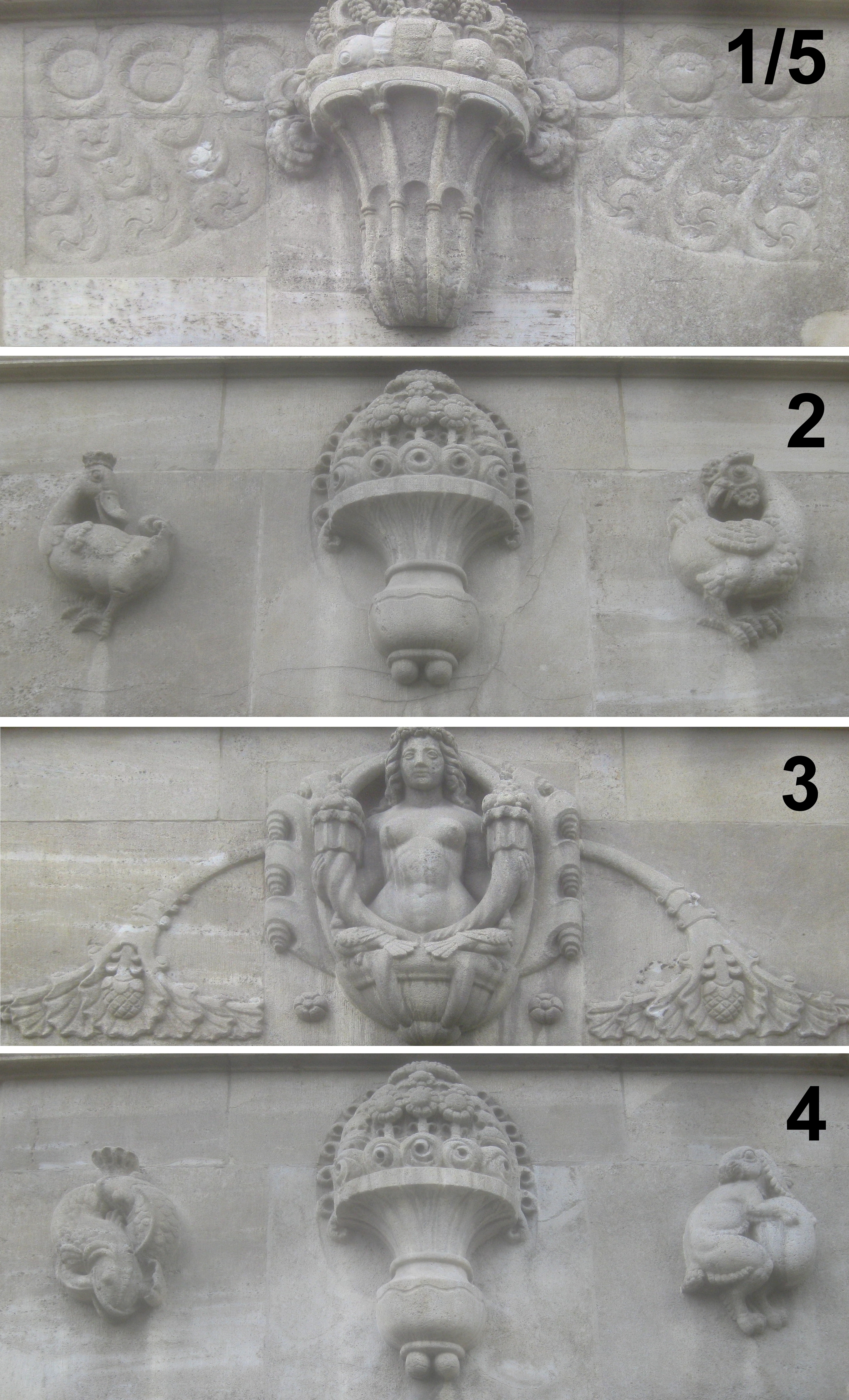 Reliefs von Josef Zeitler zwischen den Fensterreihen des ersten und zweiten Obergeschosses an der Hauptfassade der Stuttgarter Markthalle, 1911–1914, Stuttgart, Dorotheenstraße 4. Legende (Nummerierung von links nach rechts): 1/5. Vase mit Früchten 2. Ente, Vase mit Blumen, Hahn 3. fischschwänzige, nackte Nixe mit zwei Füllhörnern 4. zwei schwanzbeißende Fische, Vase mit Blumen, Eichhörnchen mit Riesennuss.